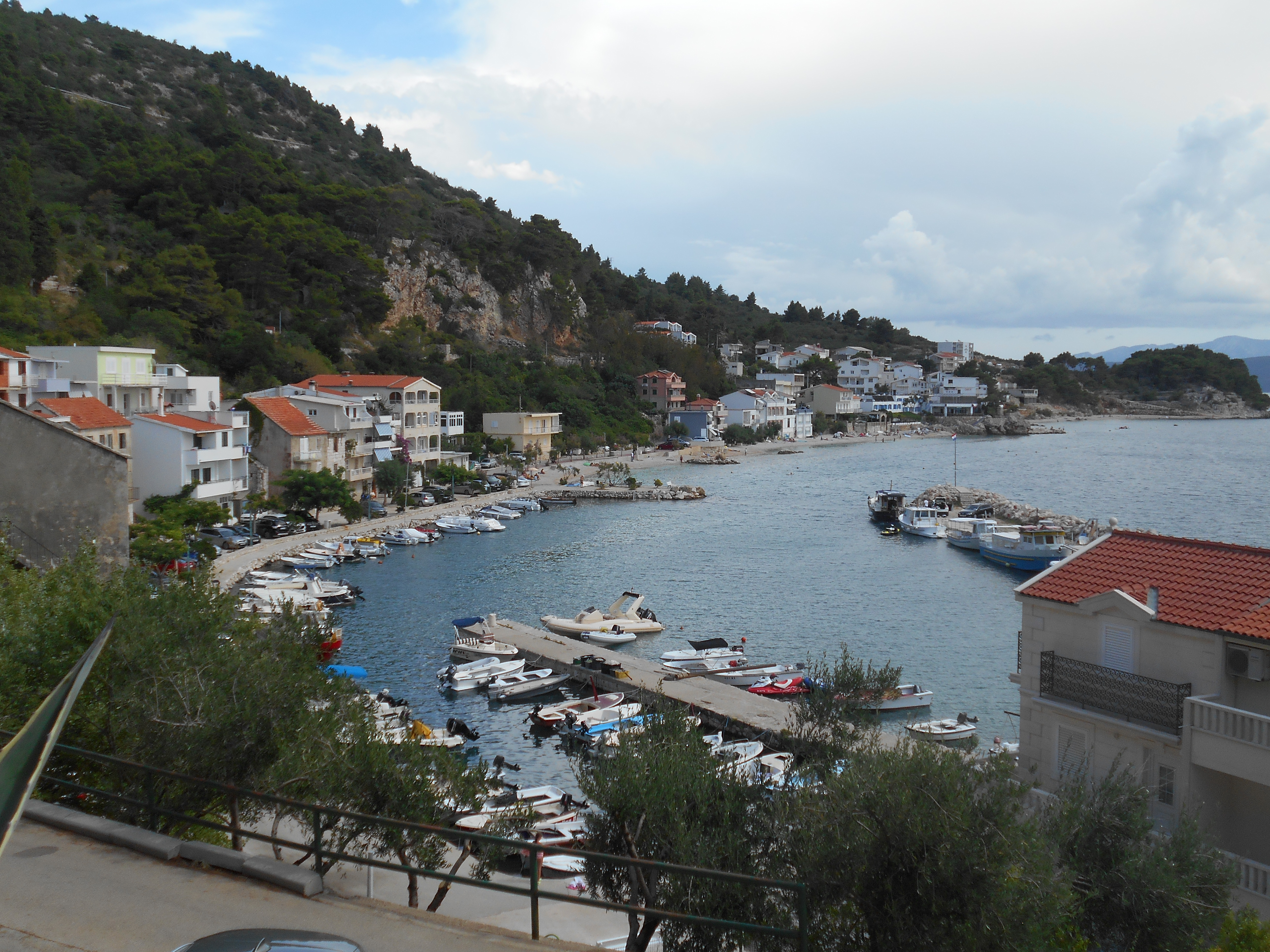 Pohled na Drašnici